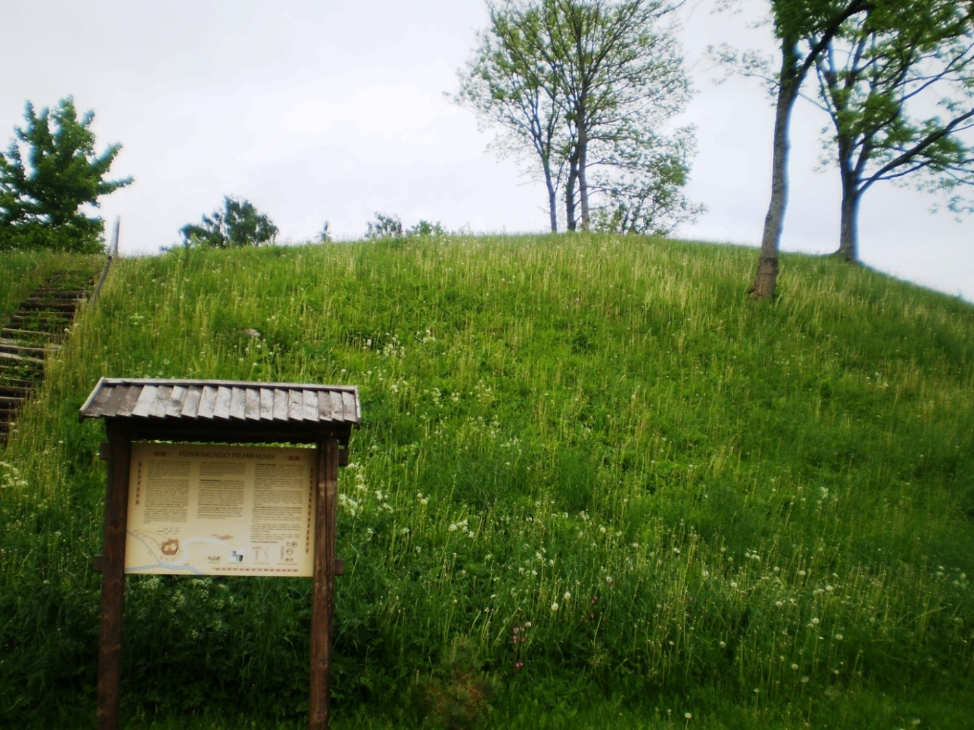 Plinkaigalio piliakalnis, Kėdainių raj.